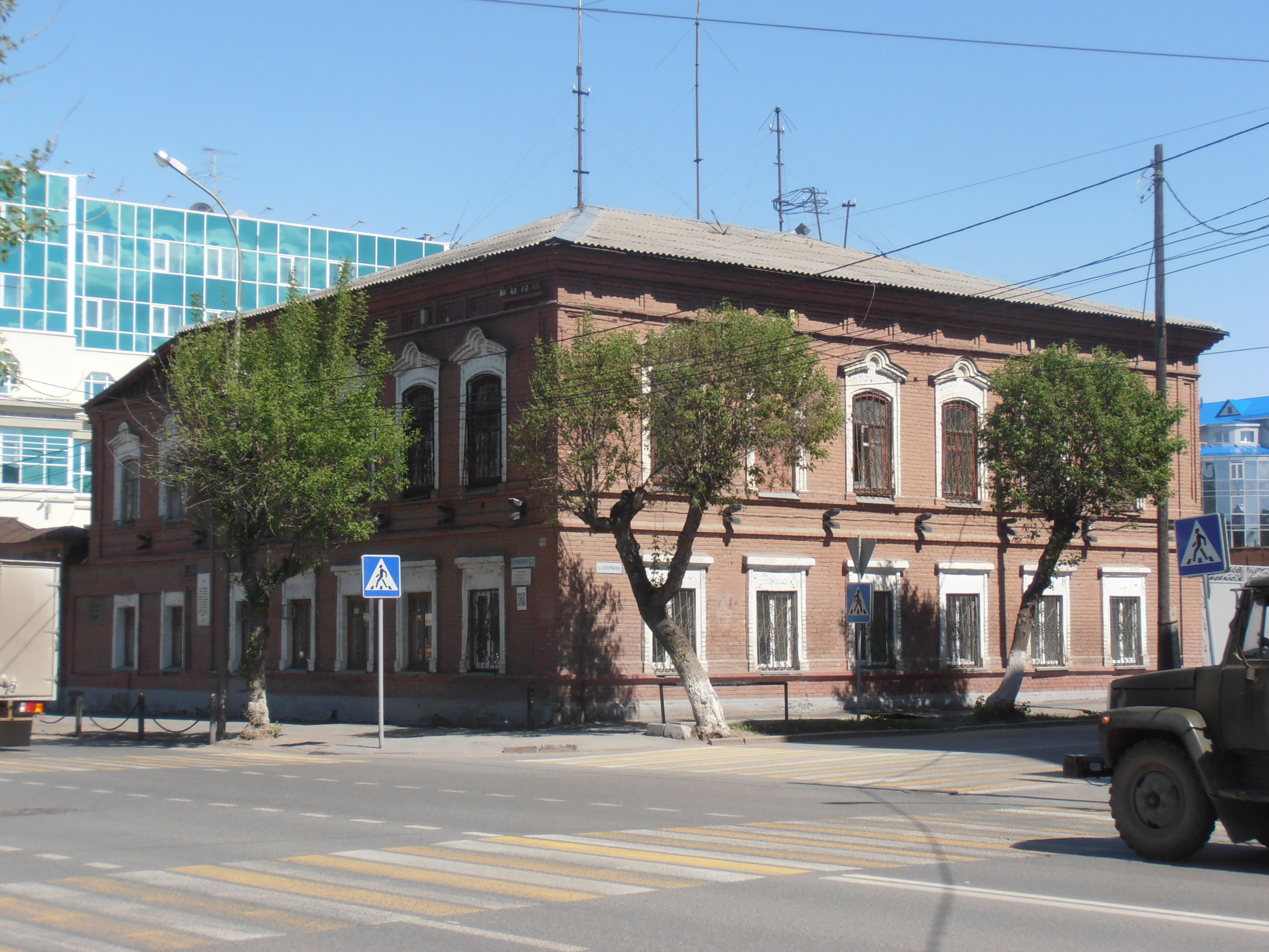 Дом Максимовых-Вардроппер. Призывной пункт отдела военкомата Тюменской области по Калининскому и Центральному административным округам г. Тюмени (ул. Челюскинцев, 23 / ул. Хохрякова, 17).